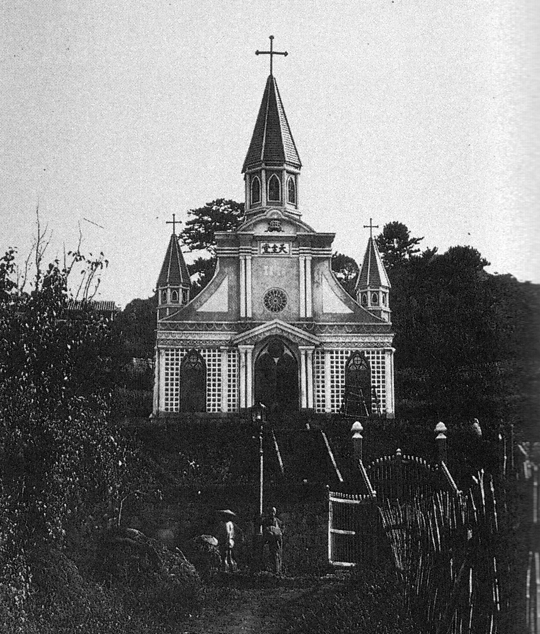 創建当時の大浦天主堂。